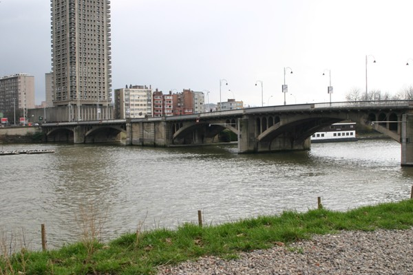 Atlas-Bréck Auteur: Les Meloures